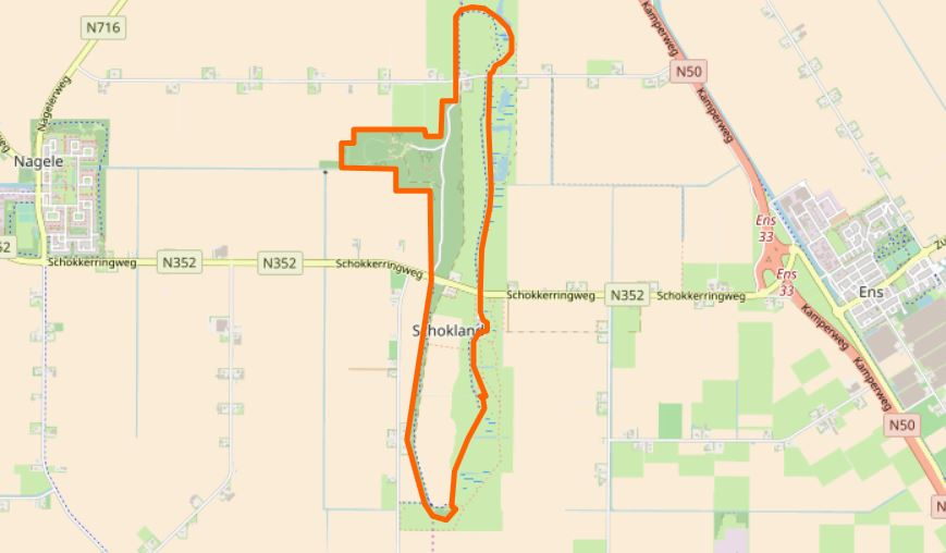 Géolocalisation et limites du site classé patrimoine mondial de l'Unesco Schokland.